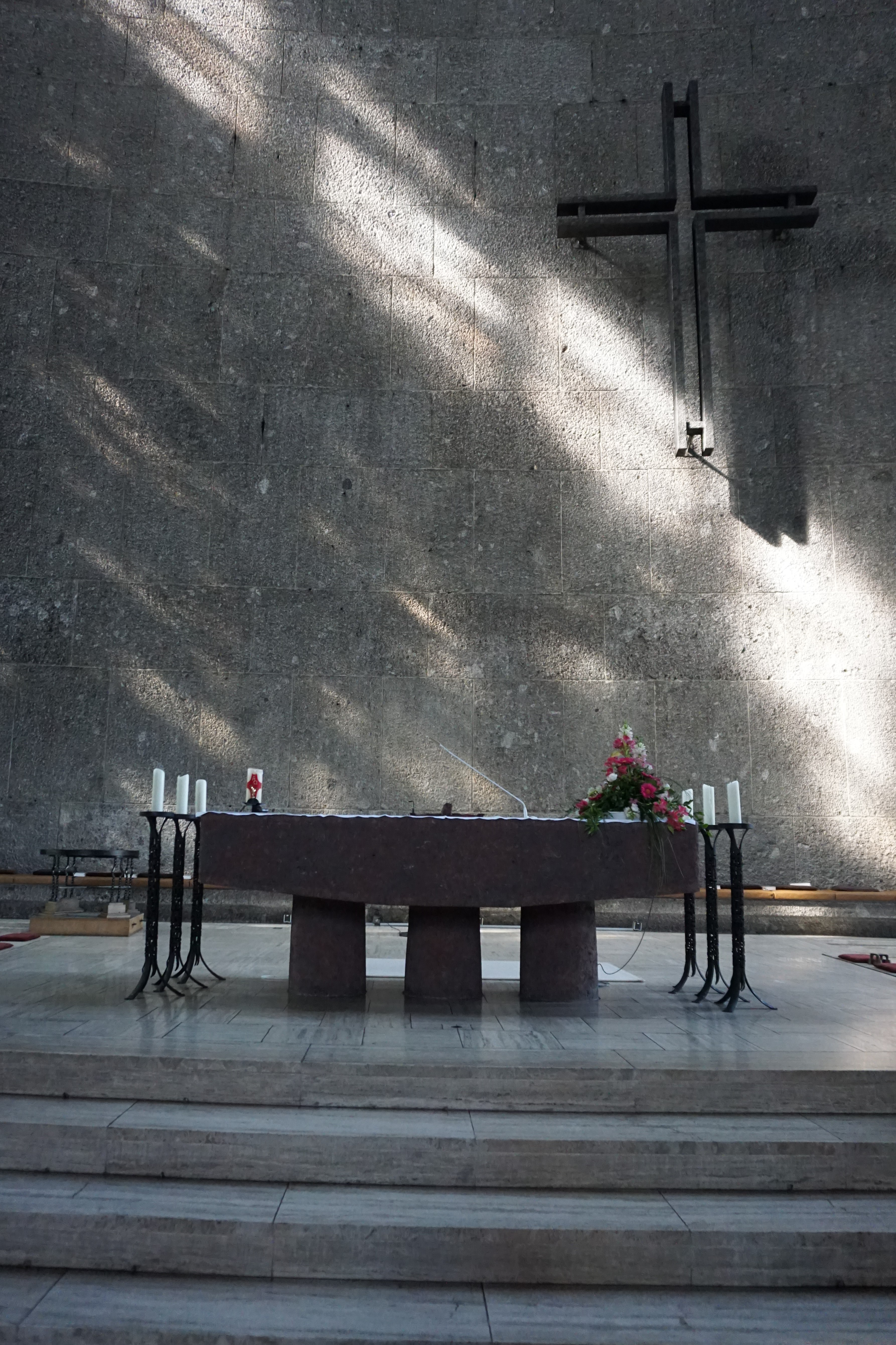 St. Thomas Morus ist ein modernes Kirchengebäude im Münchner Stadtteil Sendling-Westpark. Es ist als Baudenkmal in die Denkmalliste eingetragen.